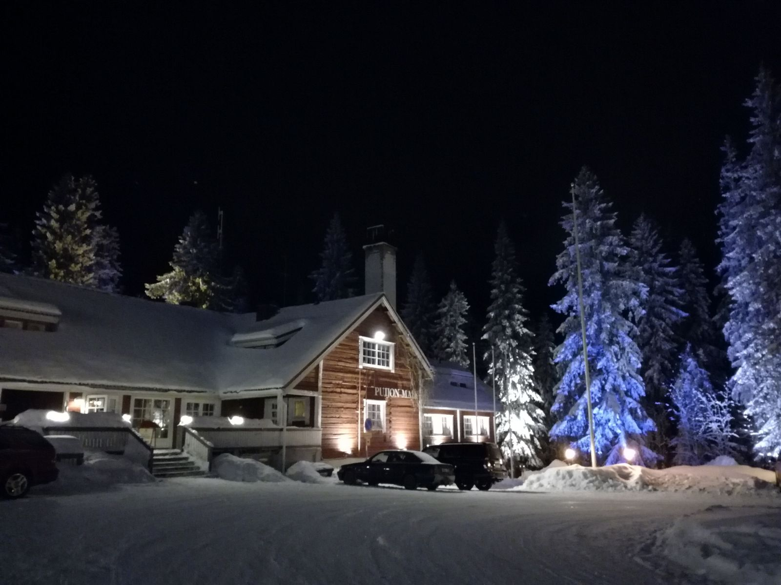 Hotelli Puijonmaja Puijon tornin juurella. -2017